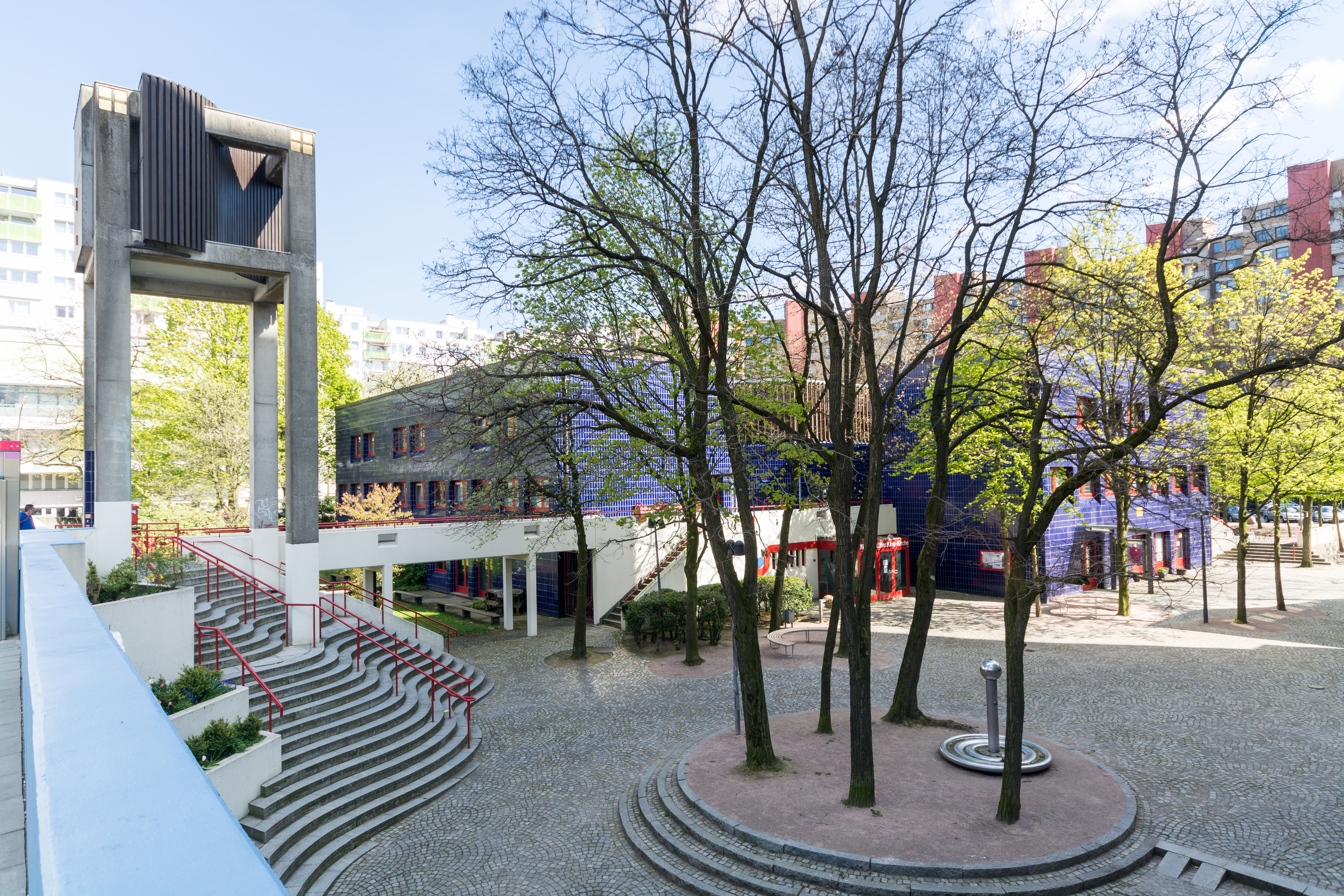 Kirchengebäude/Gemeindezentrum Martin-Luther-King-Kirche in Hamburg-Steilshoop. This is a photograph of an architectural monument.